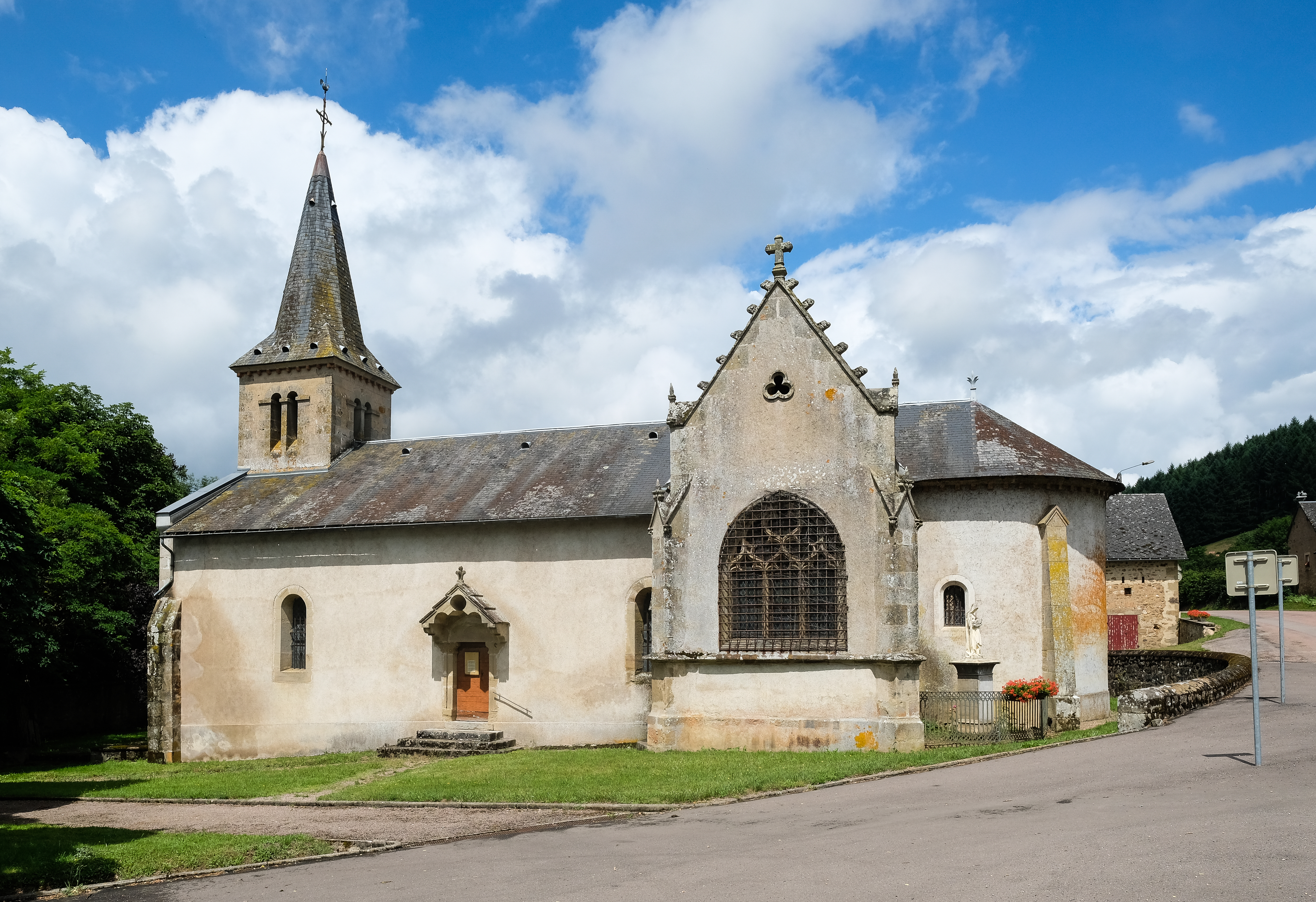 Église de l'Assomption de La Petite-Verrière, La Petite-Verrière, Département Saône-et-Loire, Bourgogne-Franche-Comté, France